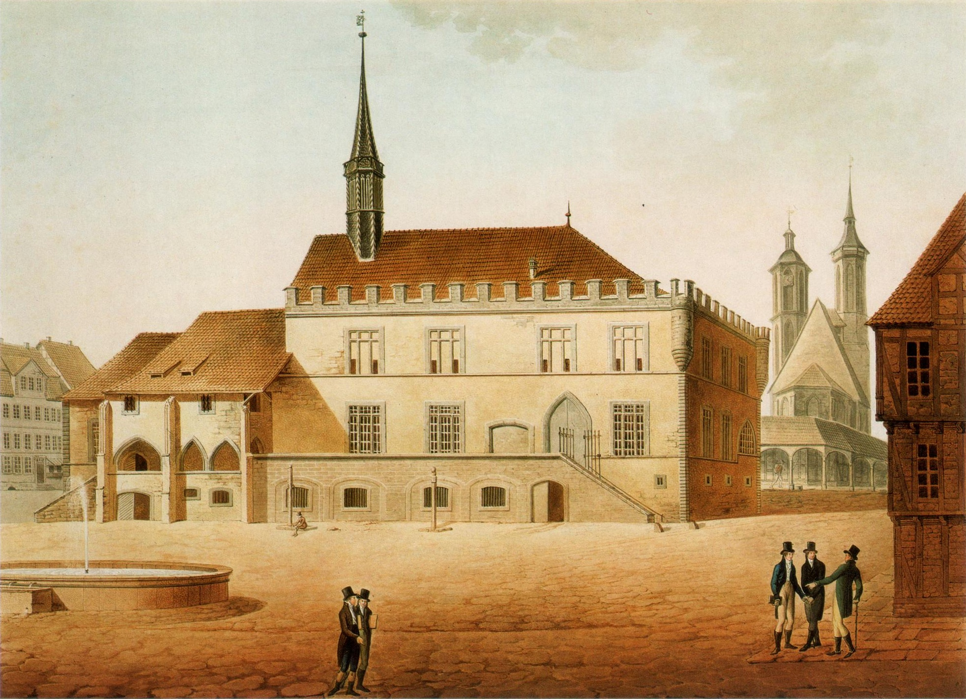 Altes Rathaus der Stadt Göttingen, Ansicht der Vorderfront mit Marktplatz und Marktbrunnen (ganz links). Hinten rechts die Johanniskirche vor der Veränderung des Chores 1895–97 durch C. W. Hase, davor der Arkadengang des Fleischscharrens. Aquarell